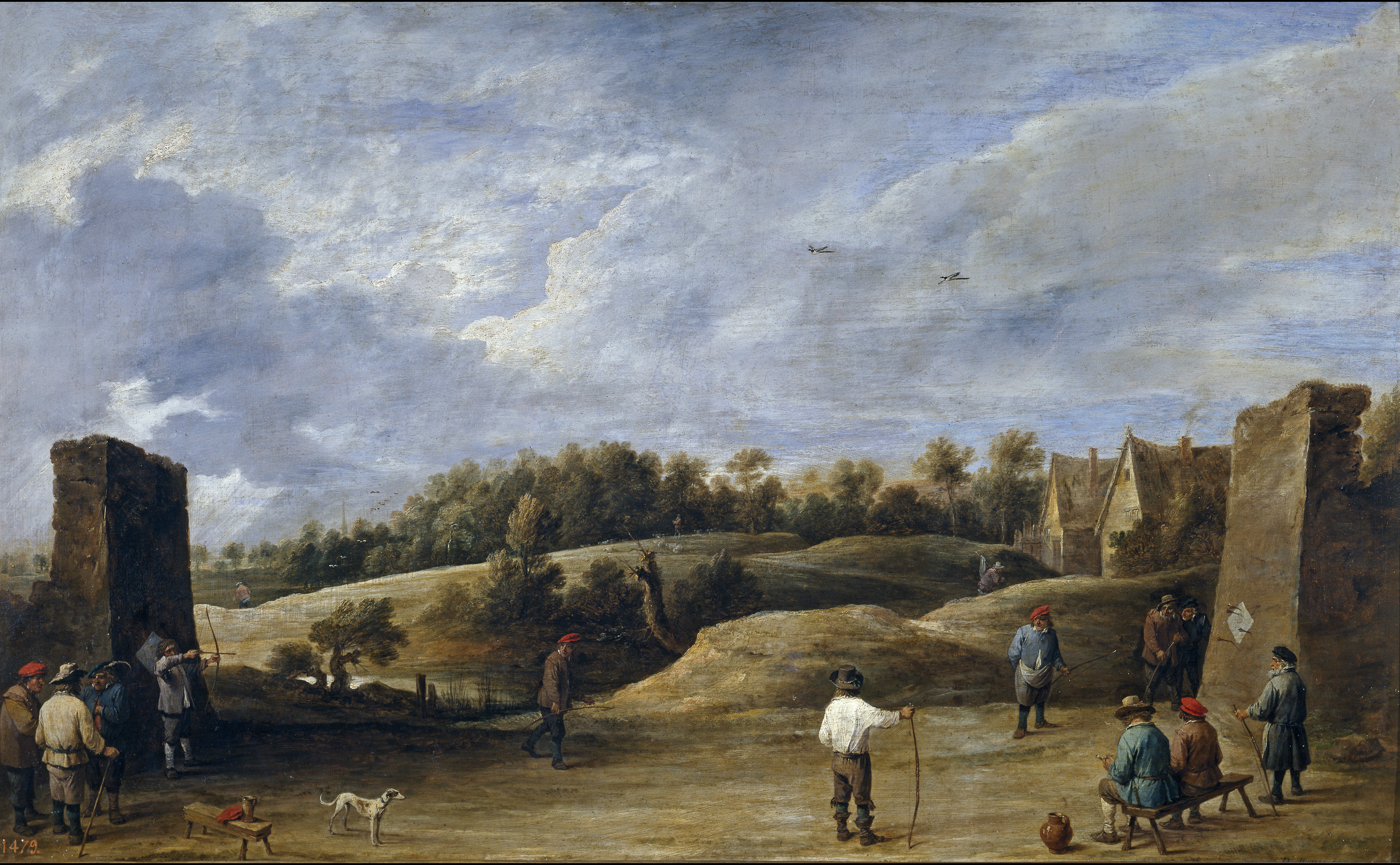 Tiro con arcolabel QS:Les,"Tiro con arco"label QS:Lde,"Bogenschießen"